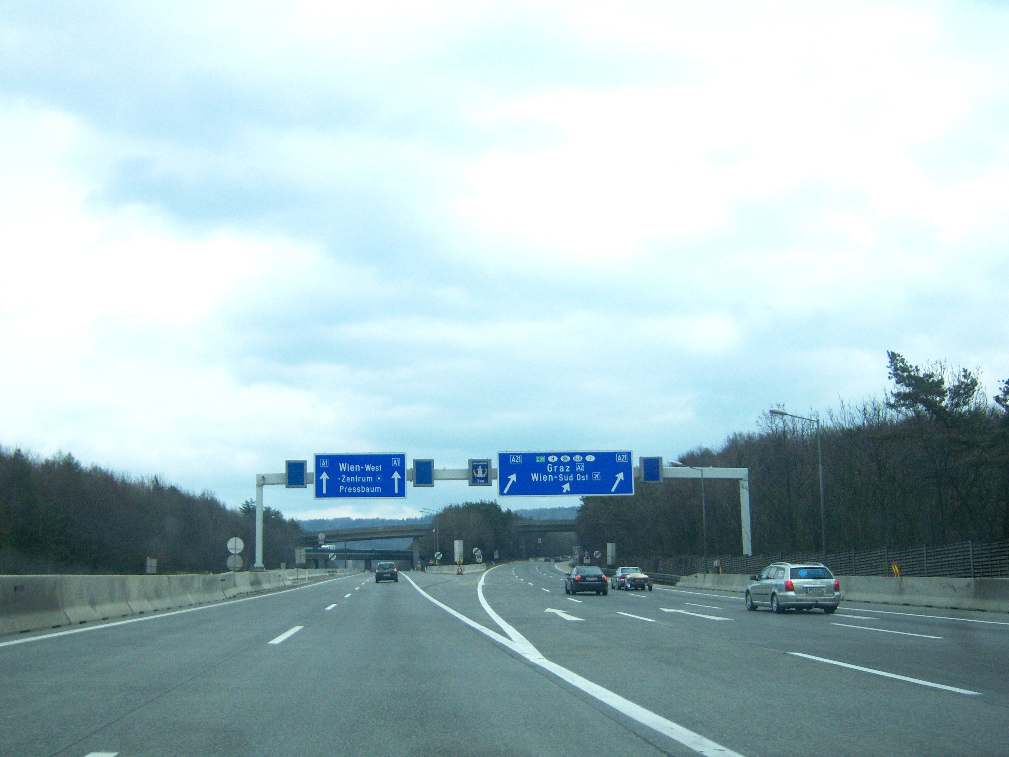 West Autobahn A1 am Knoten Steinhäusl mit der abzweigenden Wiener Außenring Autobahn A21